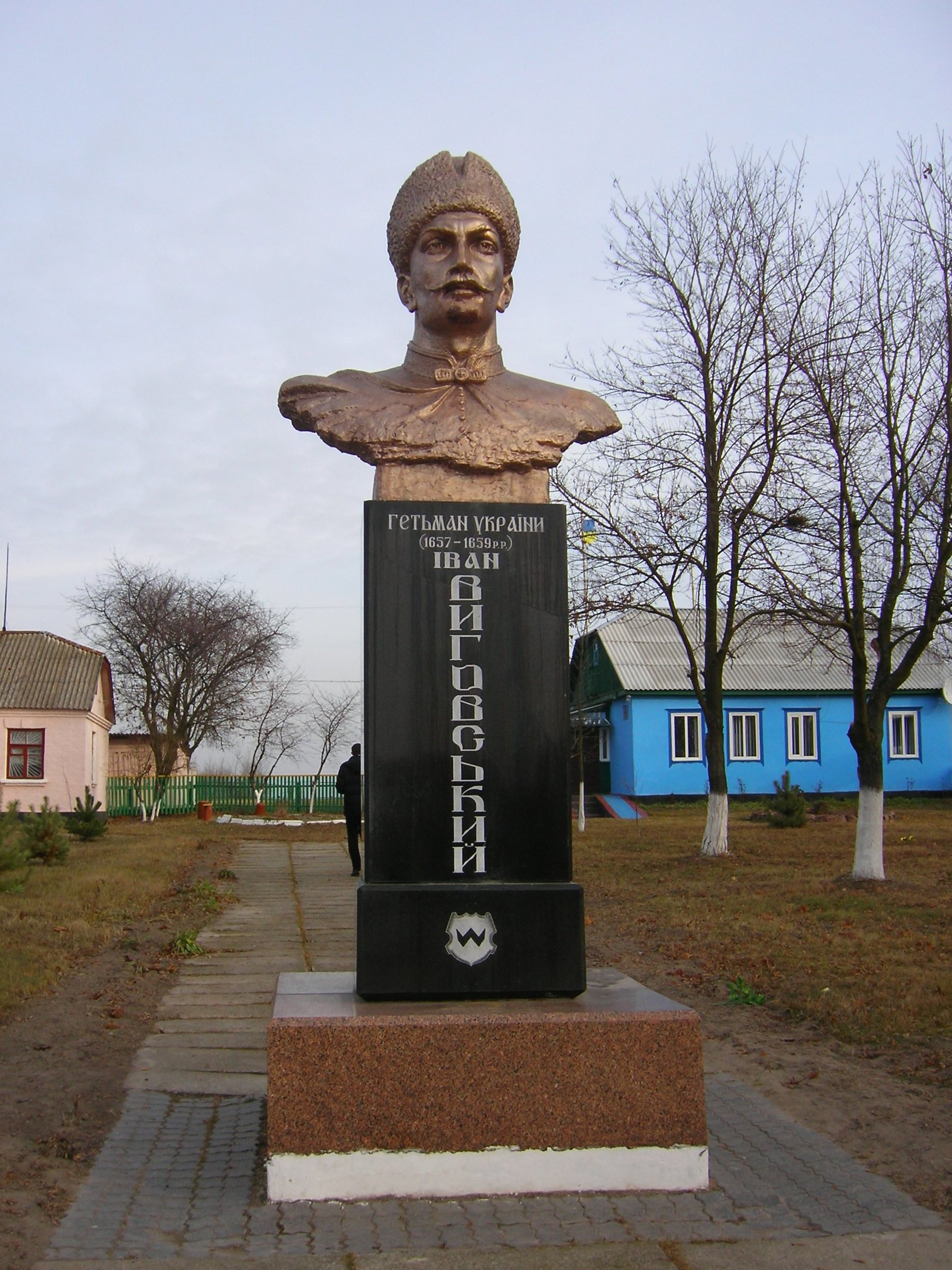 Вигів. Пам'ятник Гетьману України Іванові Виговському